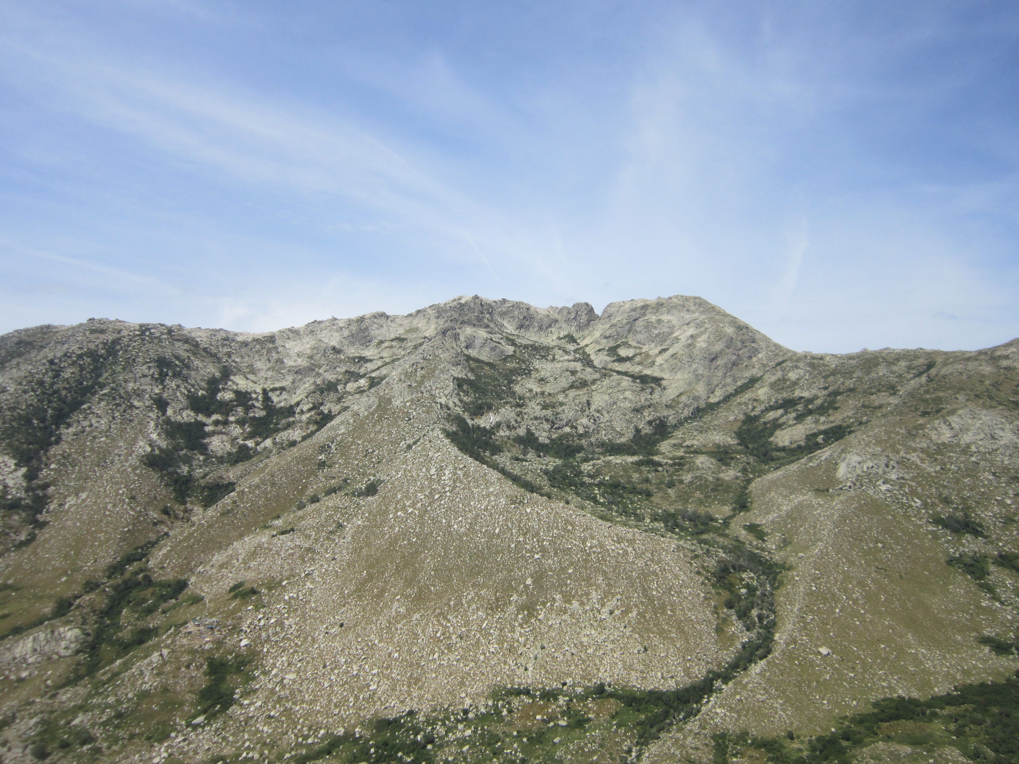 Alcudina (Incudine en Français) vue du Furnellu